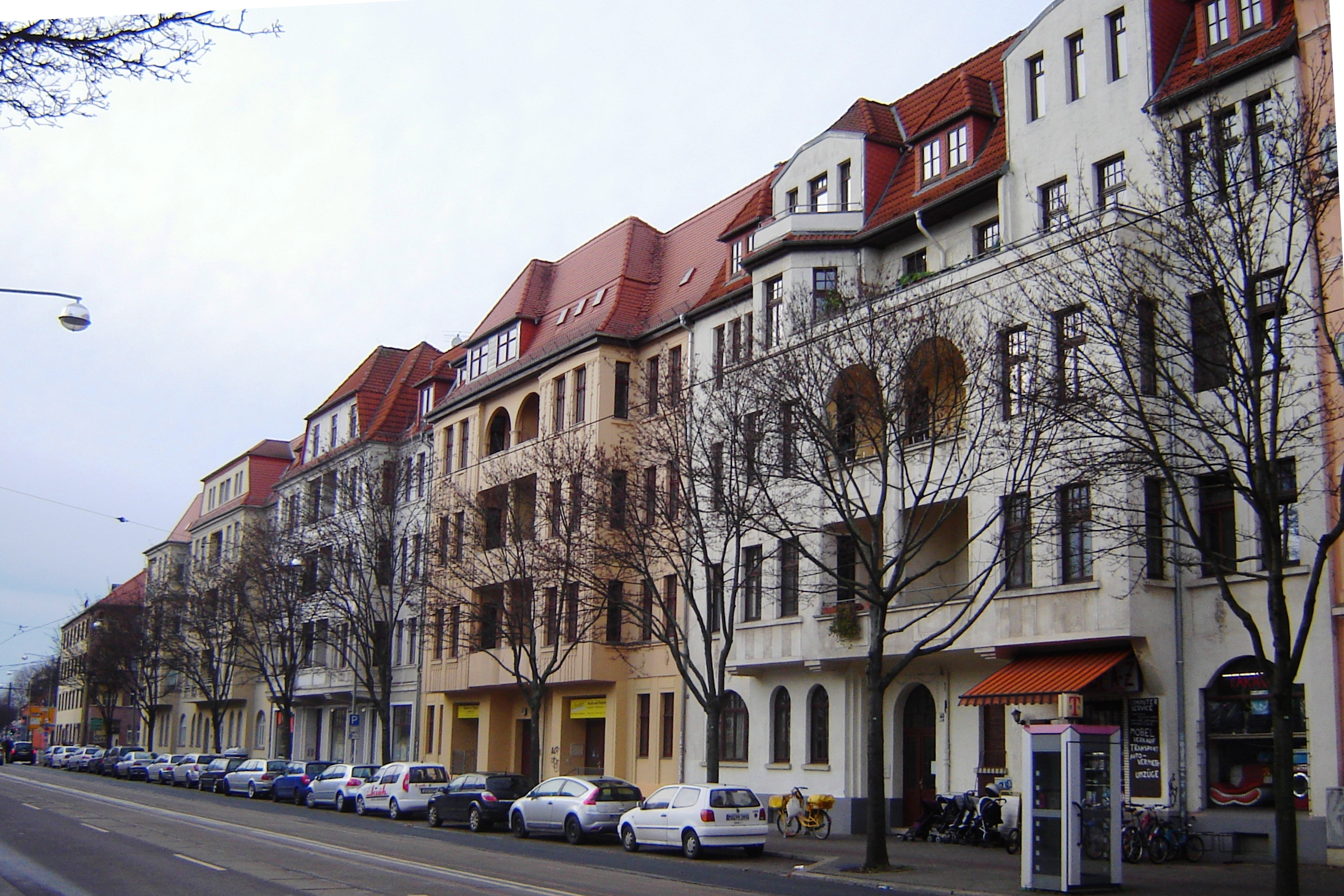 Magdeburg, Halberstädter Straße, Straßenzug 48-56 (Kulturdenkmal)